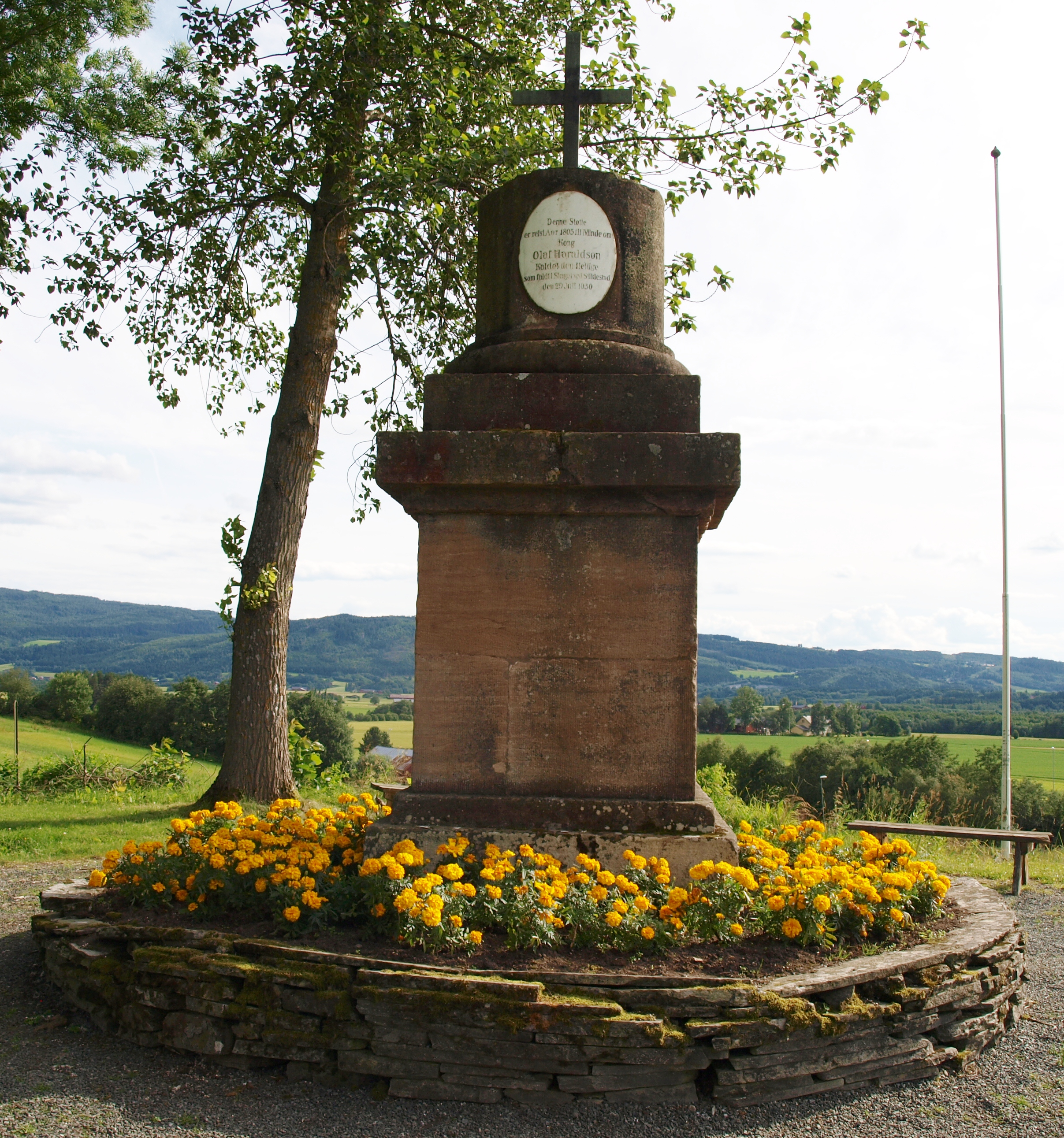 Olavsstøtta på Stiklestad nasjonale kultursenter 2011